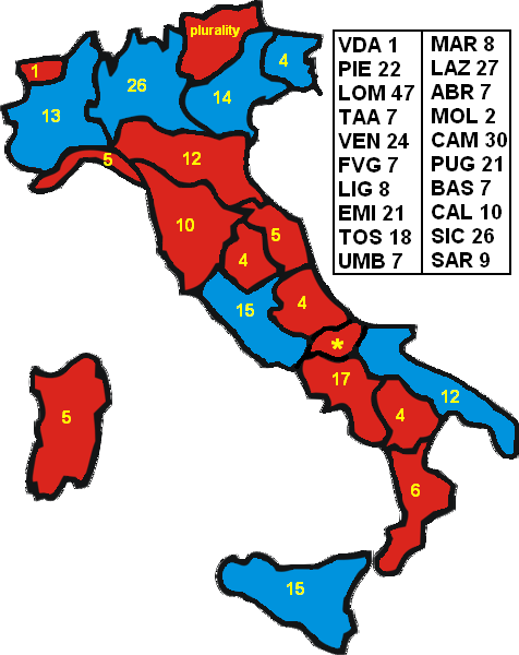 Vittorie regionali elezioni senato italiano 2006.